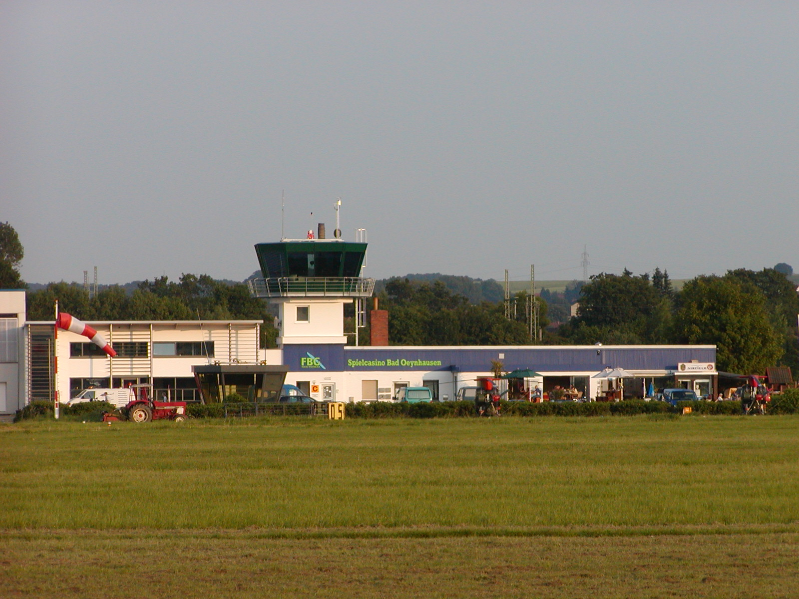 Flugplatzgebäude Sonstiges: ...